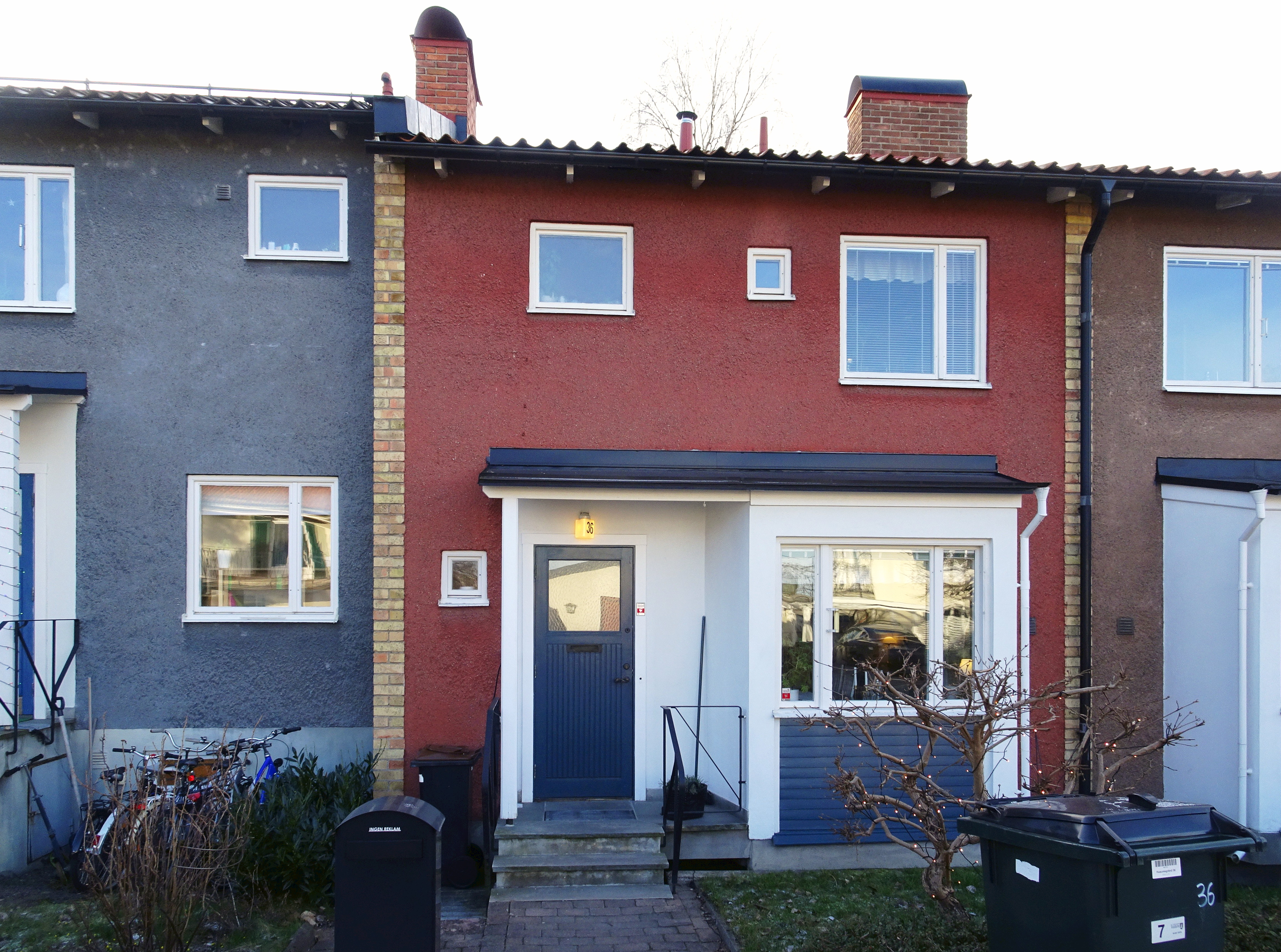 Vivstavarvsvägens radhusområde, byggår 1952, arkitekt Erik Dahl (Husumsgränd 36)